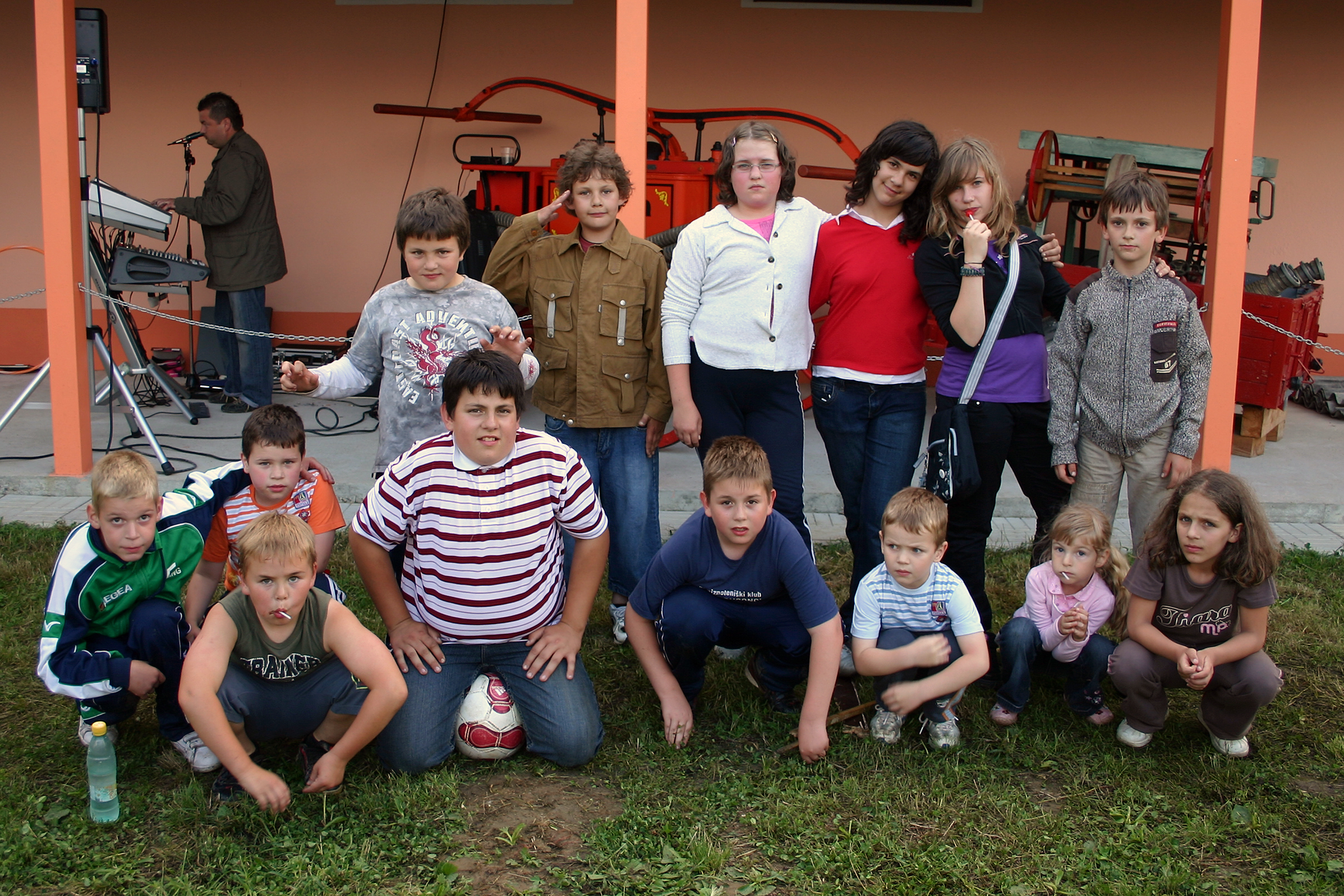 Mladi - skupinska slika